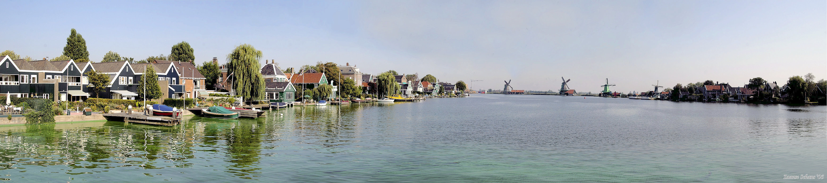 Zaanse Schans